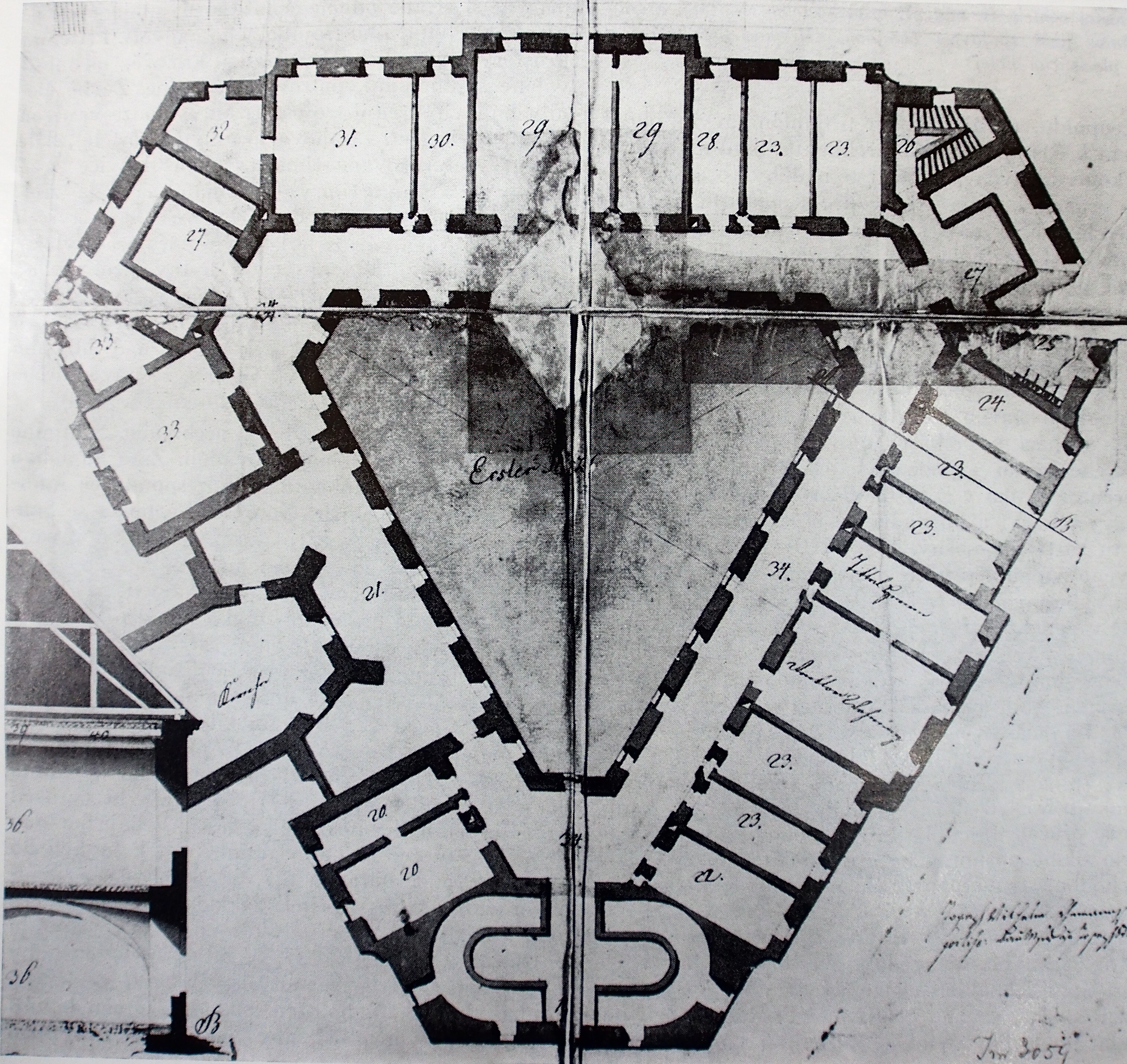 půdorys